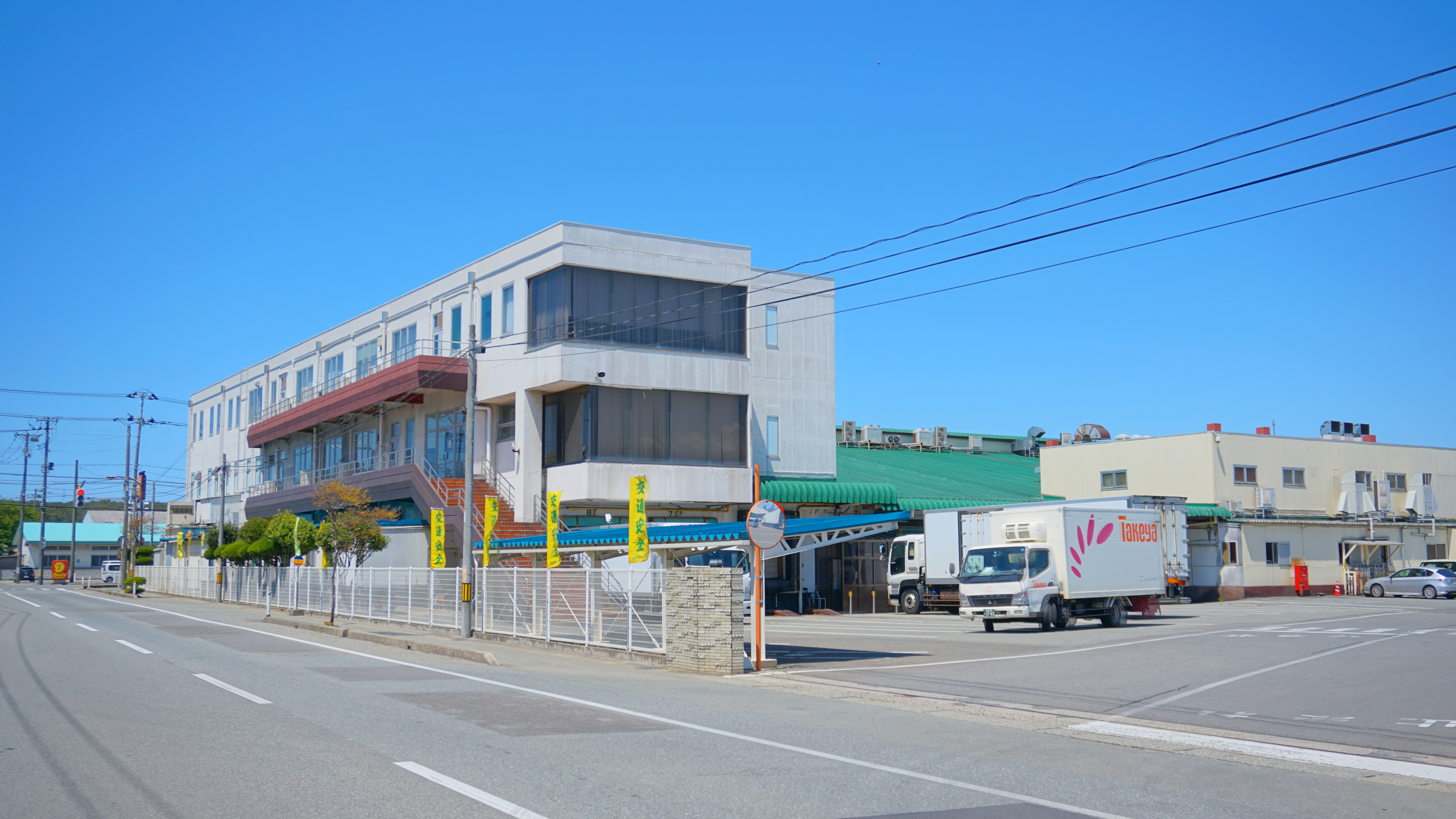 たけや製パン本社